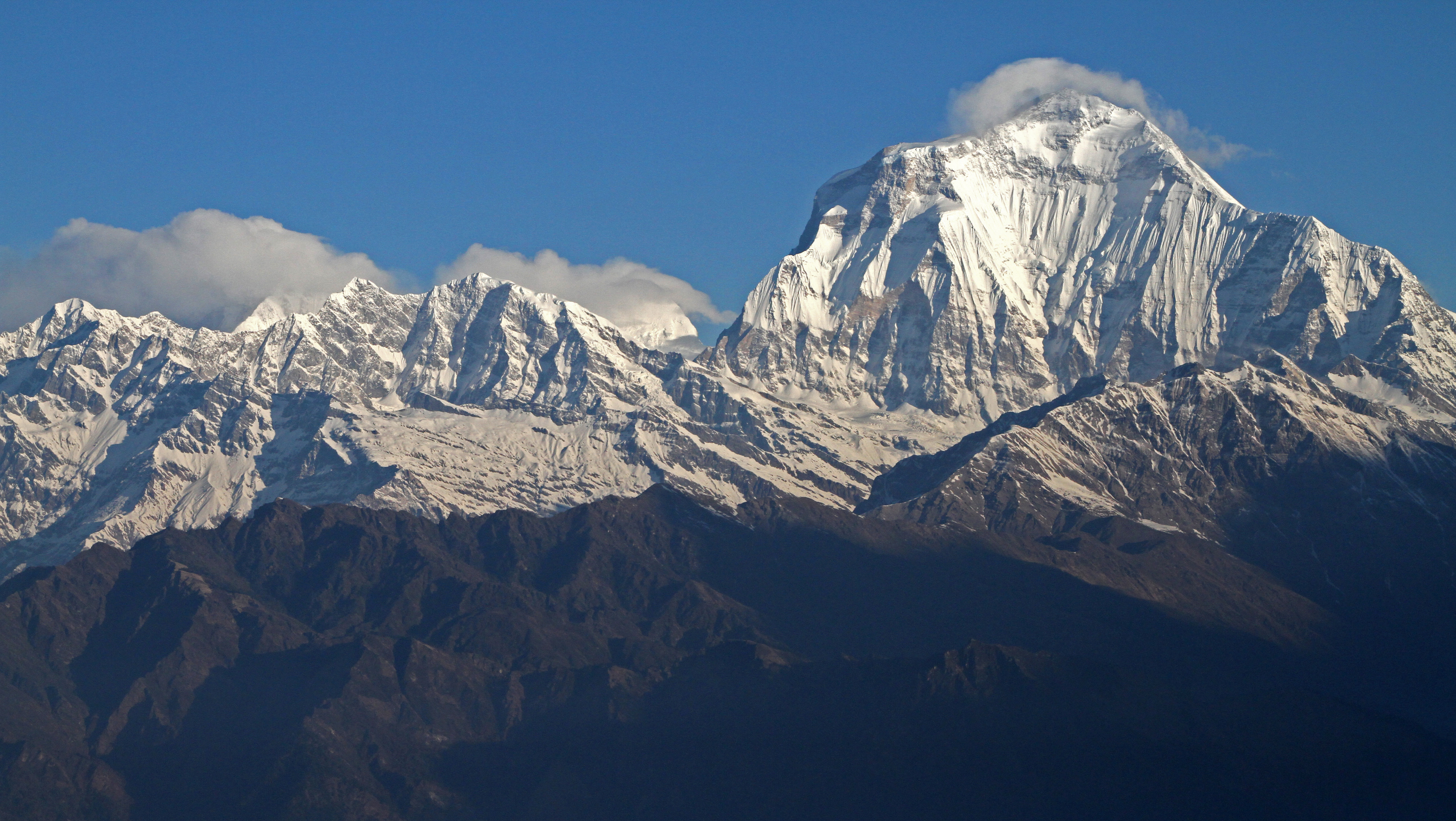 Poon Hill in Nepal